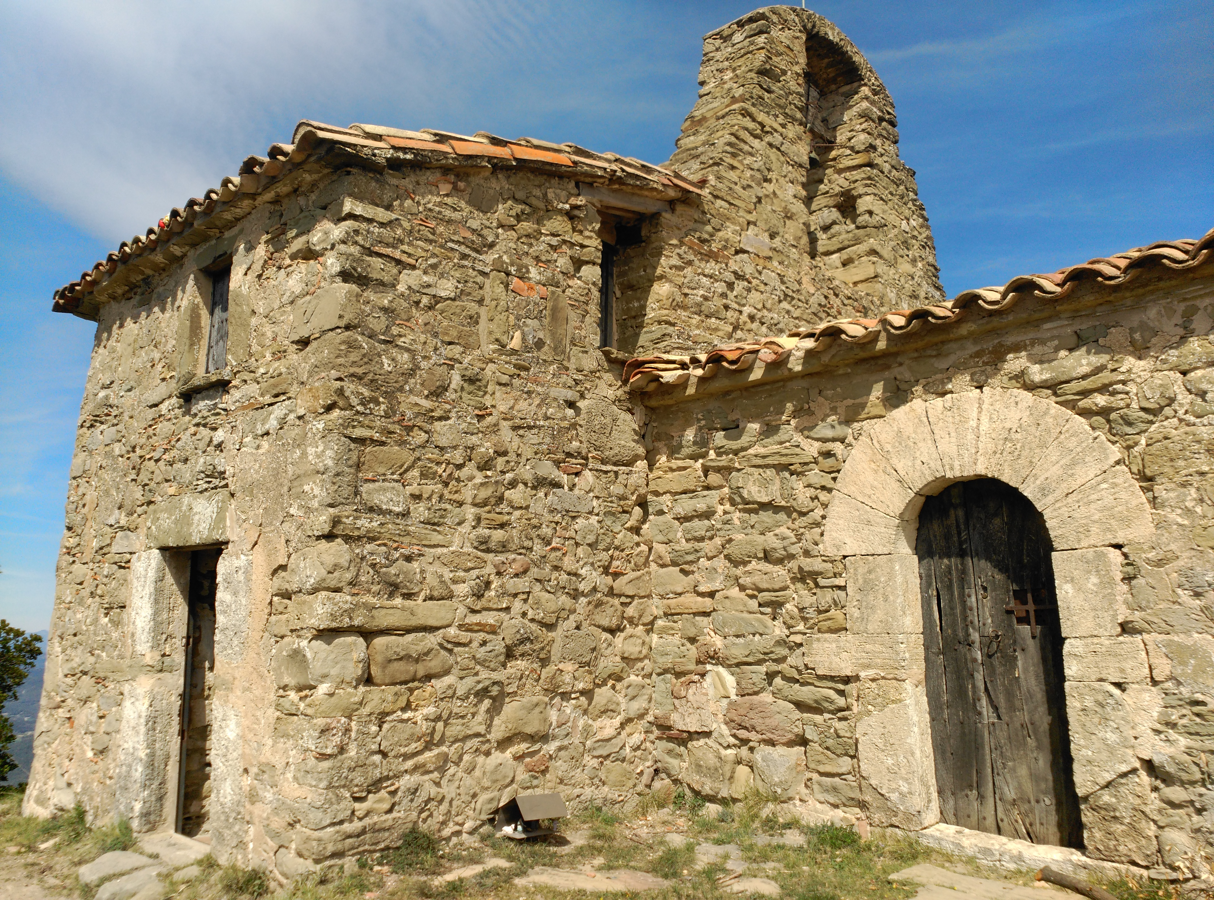 Ermita de Sant Patllari (Porqueres)